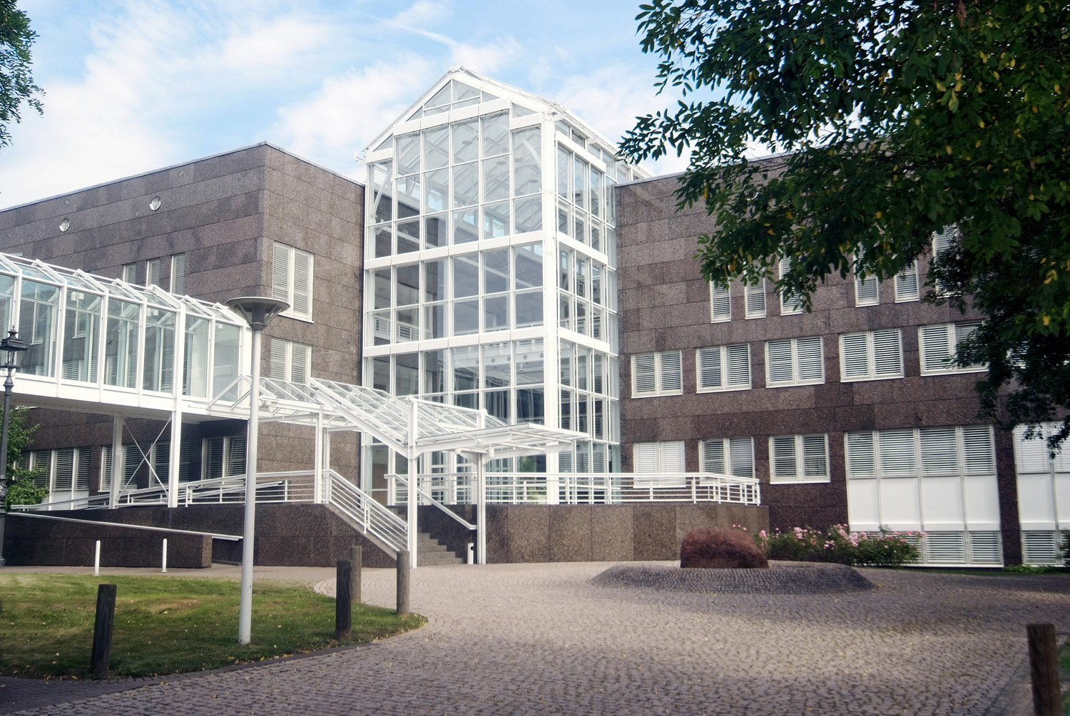 EVM Kundenzentrum Hauptleitung Koblenz